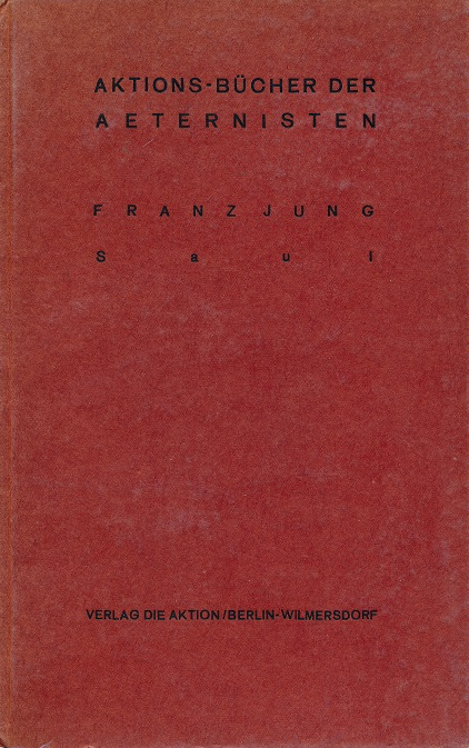 Franz Jung: Saul, Verlag Die Aktion, 1916. (Aktions-Bücher der Aeternisten). Erste Ausgabe dieser Prosasammlung.